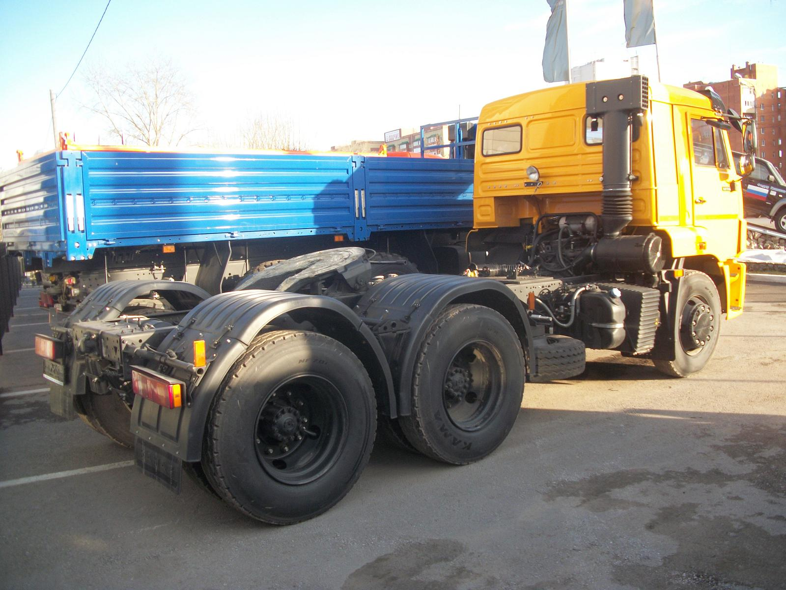 Камаз-65116, г. Тюмень